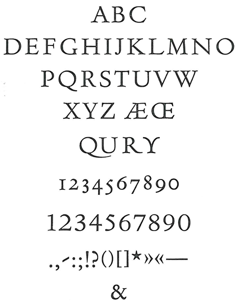 Schriftbeispiel Poliphilus. Hersteller: Monotype Corporation (1923)